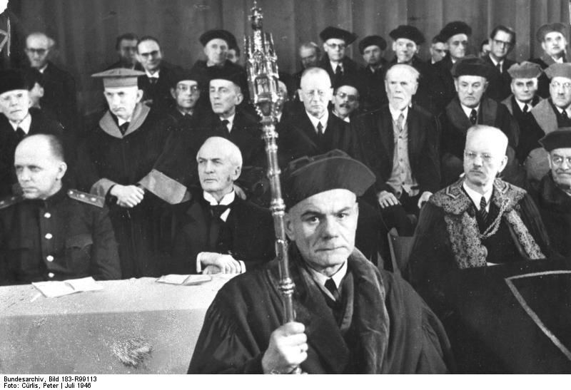 Berlin, Eröffnung der Humboldt-Universität ADN-ZB/Archiv/29.5.1989 Sowjetische Besatzungszone in Deutschland: Am 29.1.1946, acht Monate nach Beendigung des II. Weltkrieges, wurde die Berliner Universität (seit 8.2.1949 Humboldt-Universität) wiederöffnet. Der Oberbürgermeister Berlins, Arthur Werner (2.v.l.), und der neue Rektor der Universität, Prof. Dr. Johannes Stroux (2.v.r.), nach der Amtsübergabe 201-46 Abgebildete Personen: Werner, Arthur Prof. Dr.: Erster Oberbürgermeister von Berlin nach 1945, Vaterländischer Verdienstorden (VVO) in Gold 1954, DDR (PND 128558903) Stroux, Johannes Prof. Dr.: Präsident der Akademie der Wissenschaften (AdW), Rektor Universität Berlin, Deutscher Volksrat, DDR (PND 11861942X)